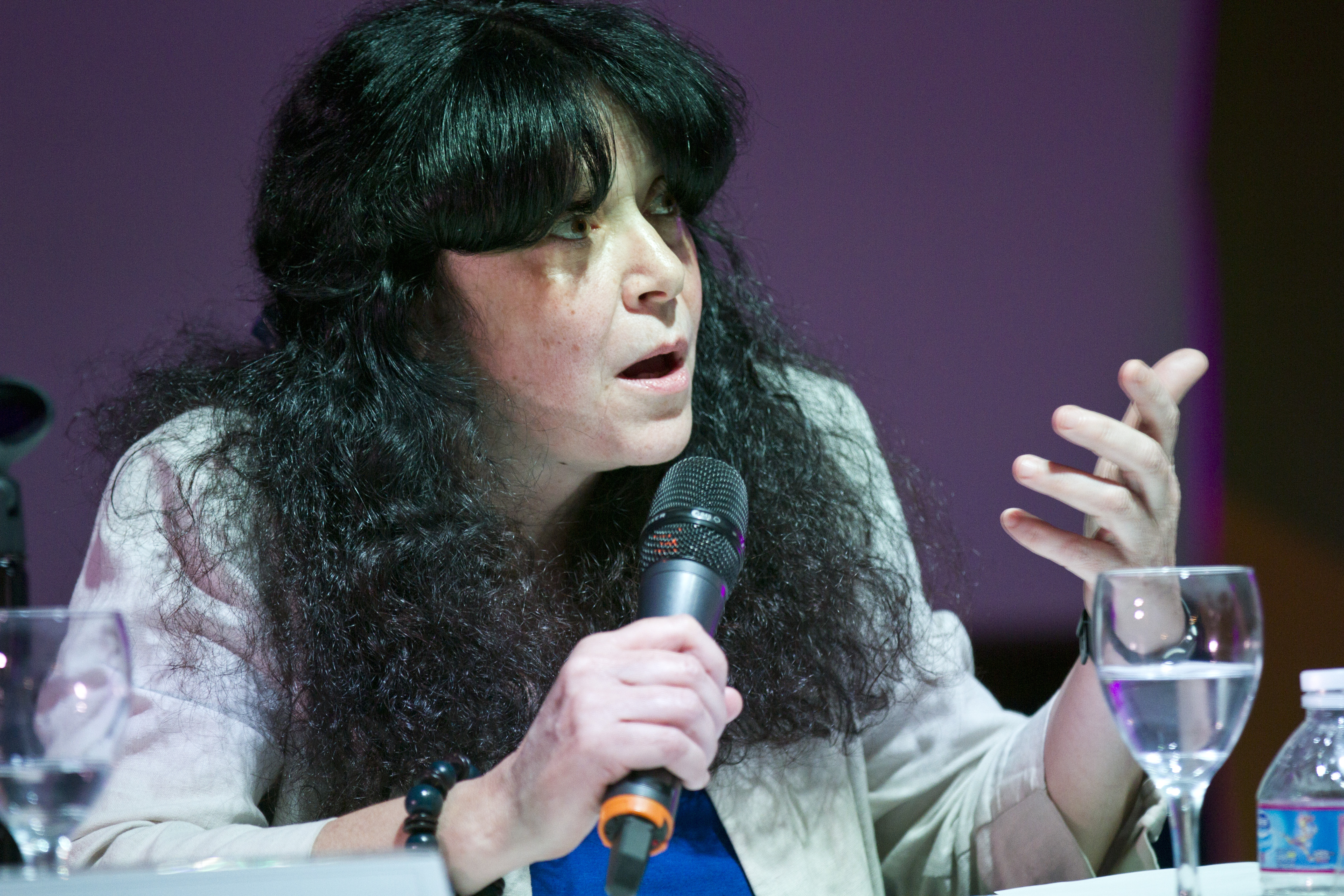 Neuquén, 27 de noviembre de 2014 - Bajo el lema “Pensar la Argentina entre dos Bicentenarios”, se lleva a cabo el capítulo Patagonia Norte de los Foros por una Nueva Independencia, en la Universidad Nacional del Comahue.En este marco se llevó a cabo la mesa panel: “La discusión de un nombre: qué decimos o qué pensamos cuándo hablamos de pensamiento nacional” con la prescencia del secretario de Coordinación Estratégica para el Pensamiento Nacional, Ricardo Forster, María Beatriz Gentile y Maristella Svampa. La mesa fue coordinada por Matías Bruera.Los Foros por una Nueva Independencia son espacios federales para la visibilización, el desarrollo, la profundización y la sistematización del debate político cultural en la Argentina, a la víspera del Segundo Bicentenario, atendiendo las encrucijadas, los desafíos y los interrogantes del presente.Fotos: Mauro Rico/ Ministerio de Cultura de la Nación.